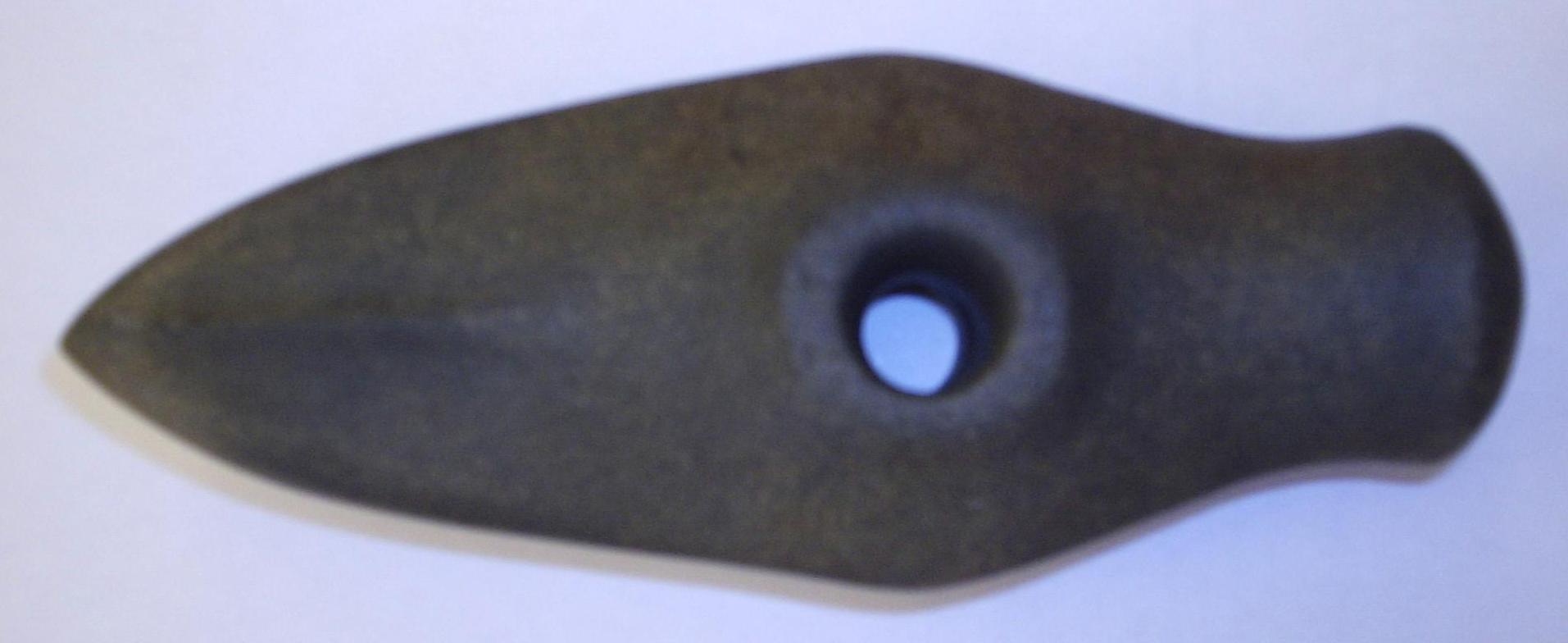 Båtyxa från Tutaryd socken i Småland, fotograferad den 18 oktober 2005 av Harri Blomberg.